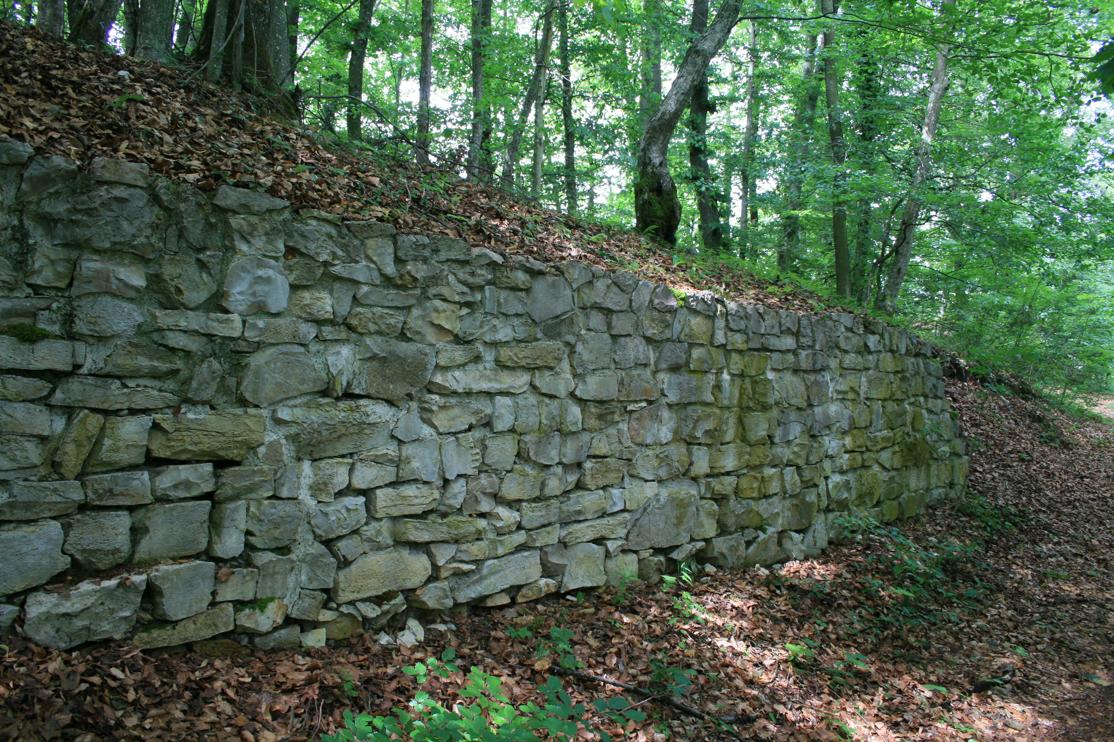 ergänztes Mauerwerk der Ringmauer, Burgruine Iberg, Riniken AG, Schweiz